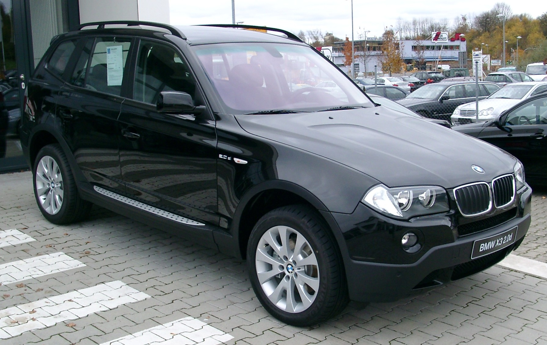 BMW X3